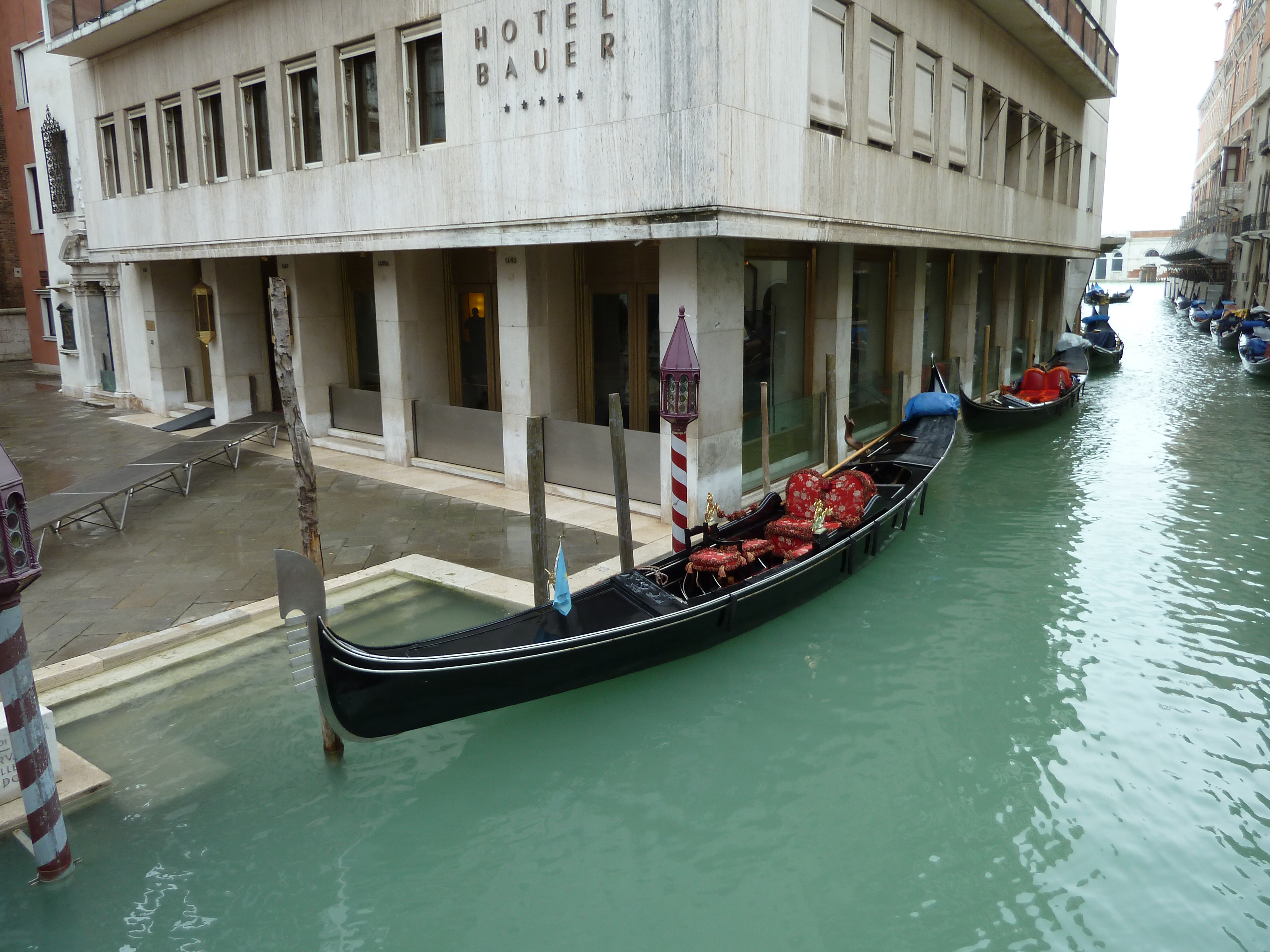 Rio s moise acqua alta